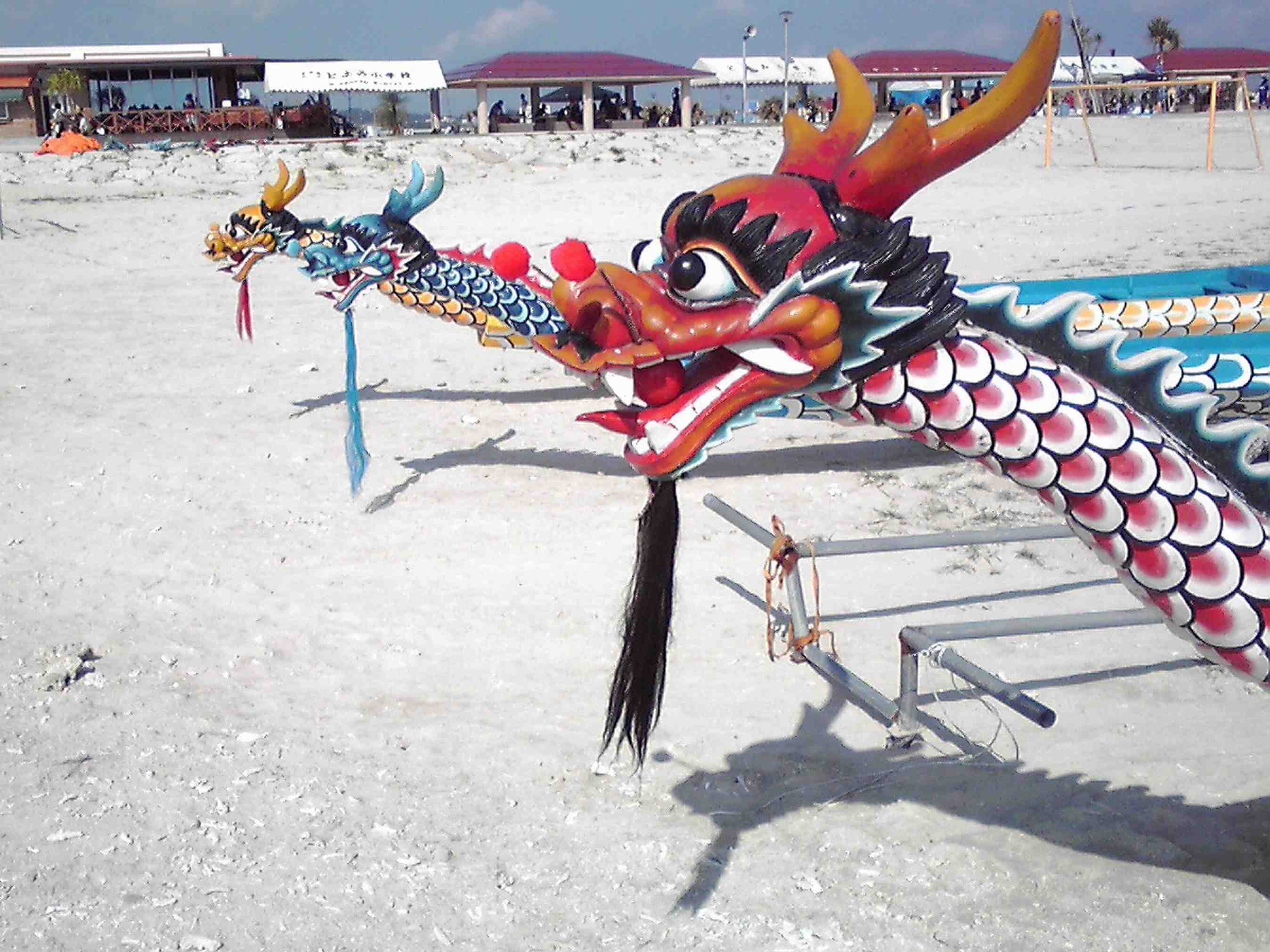 豊見城ハーリーで使用される爬龍船（はりゅうせん）の写真。豊崎フェスタ2011イベント会場で開催された、第4回豊見城ハーリー終了後に、漕手らスタッフに岸へ揚げられた状態の爬龍船。